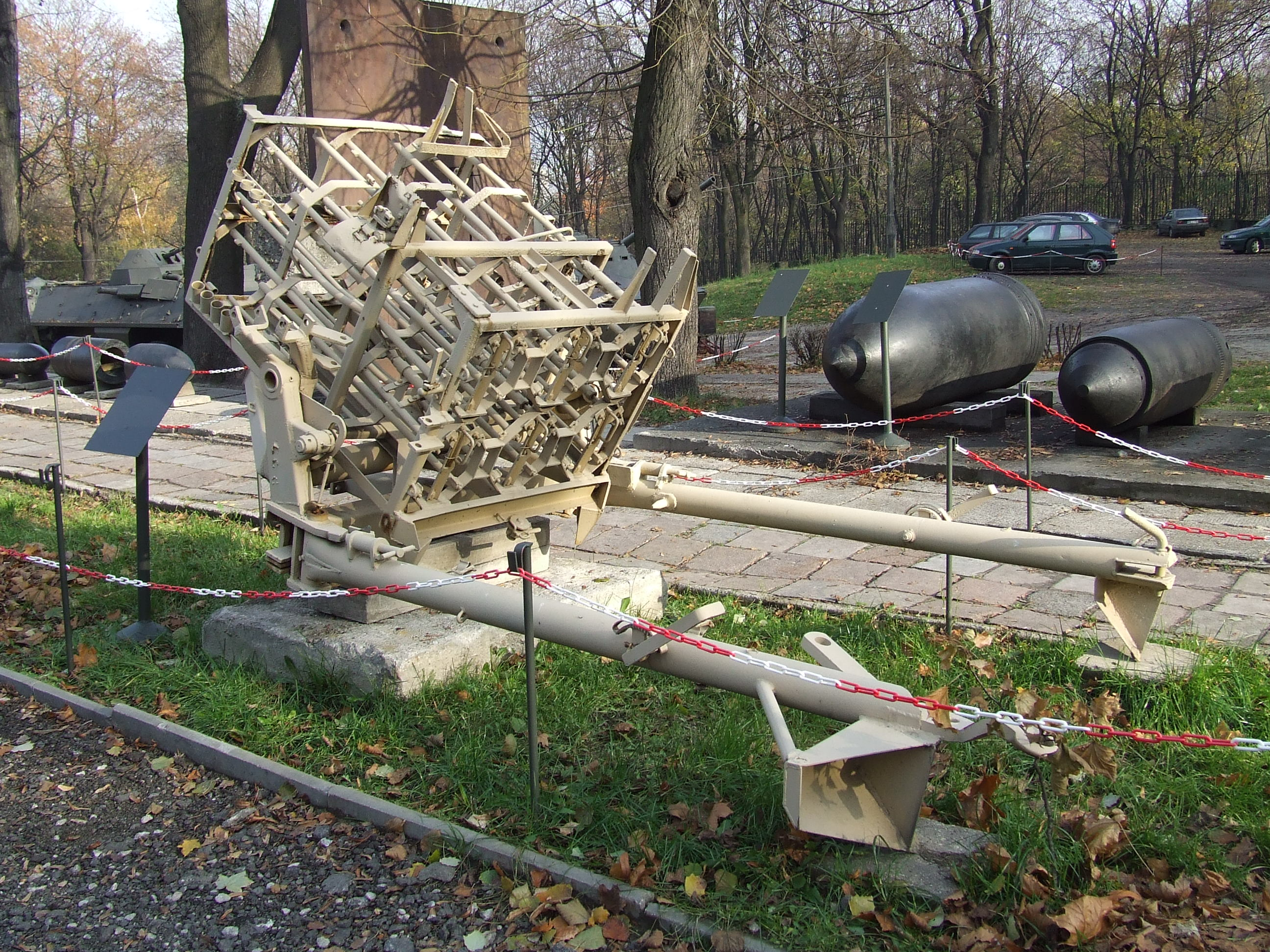 30 cm Raketenwerfer 56 w Muzeum Wojska Polskiego